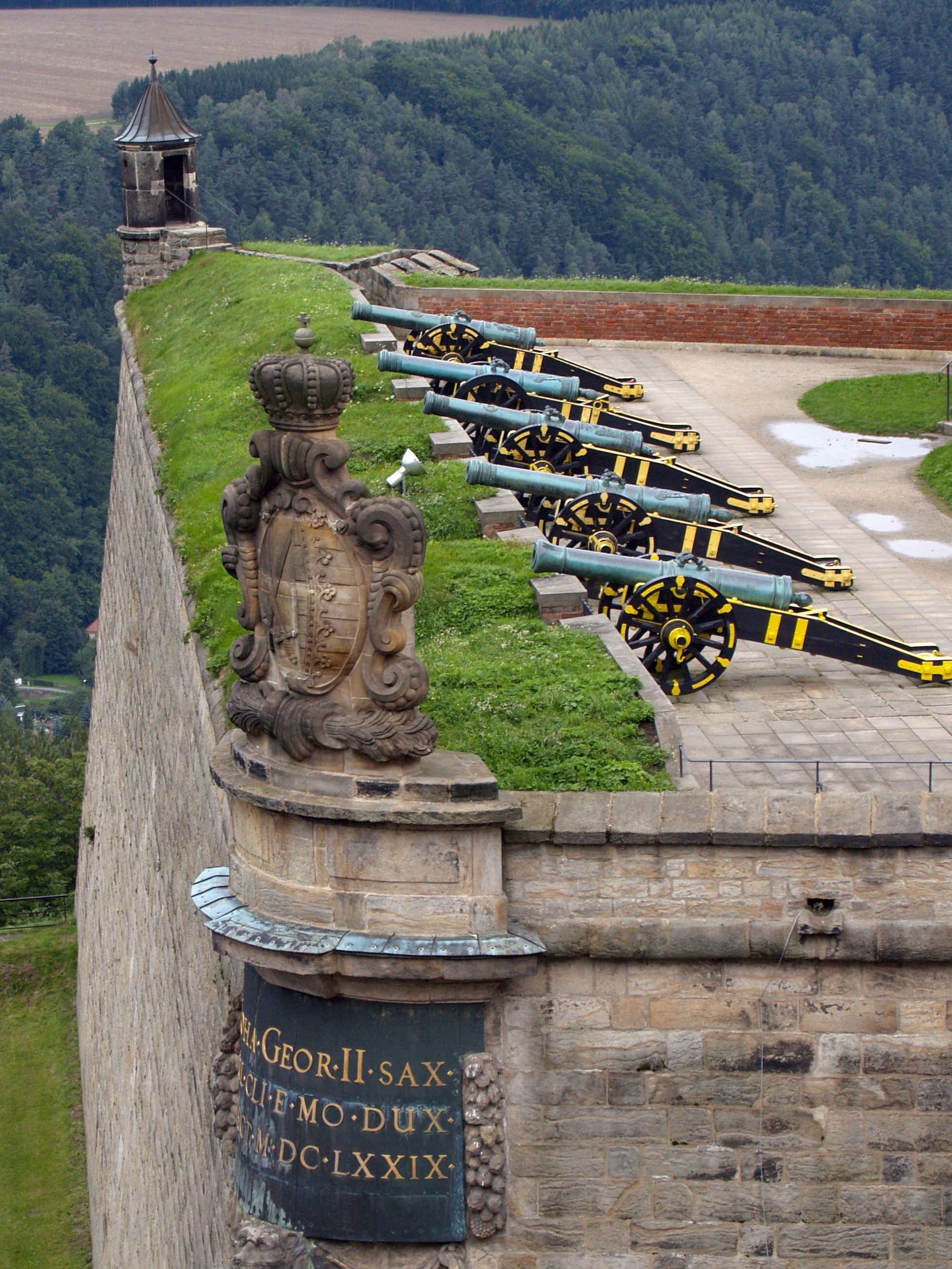 Festung Königstein - Georgenbatterie